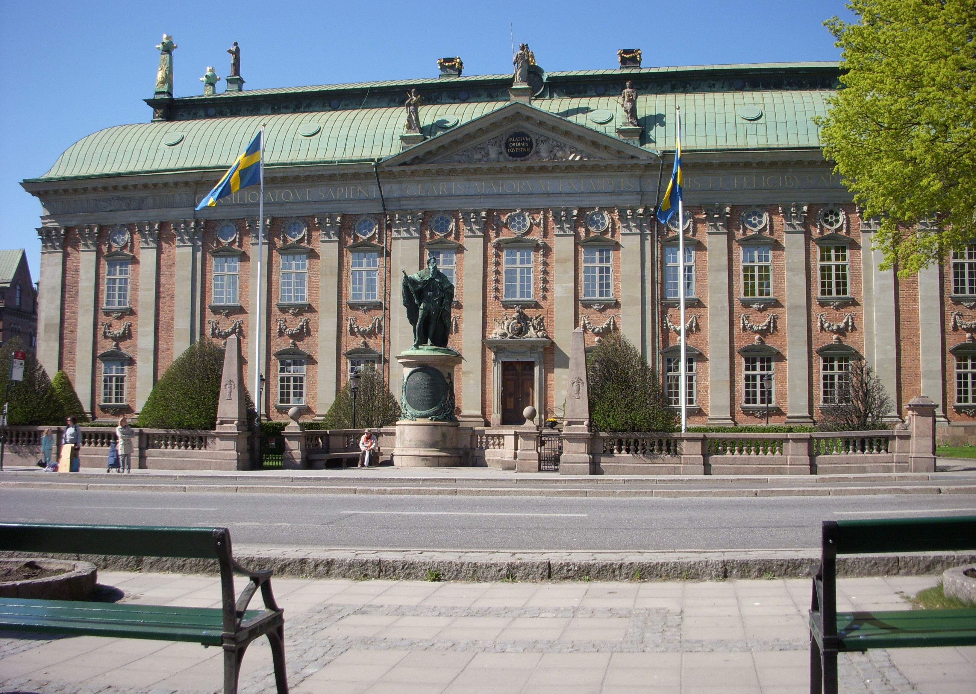 Riddarhustorget med Riddarhuset, Stockholm